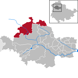 Unstruttal in Thuringia - Unstrut-Hainich-Kreis